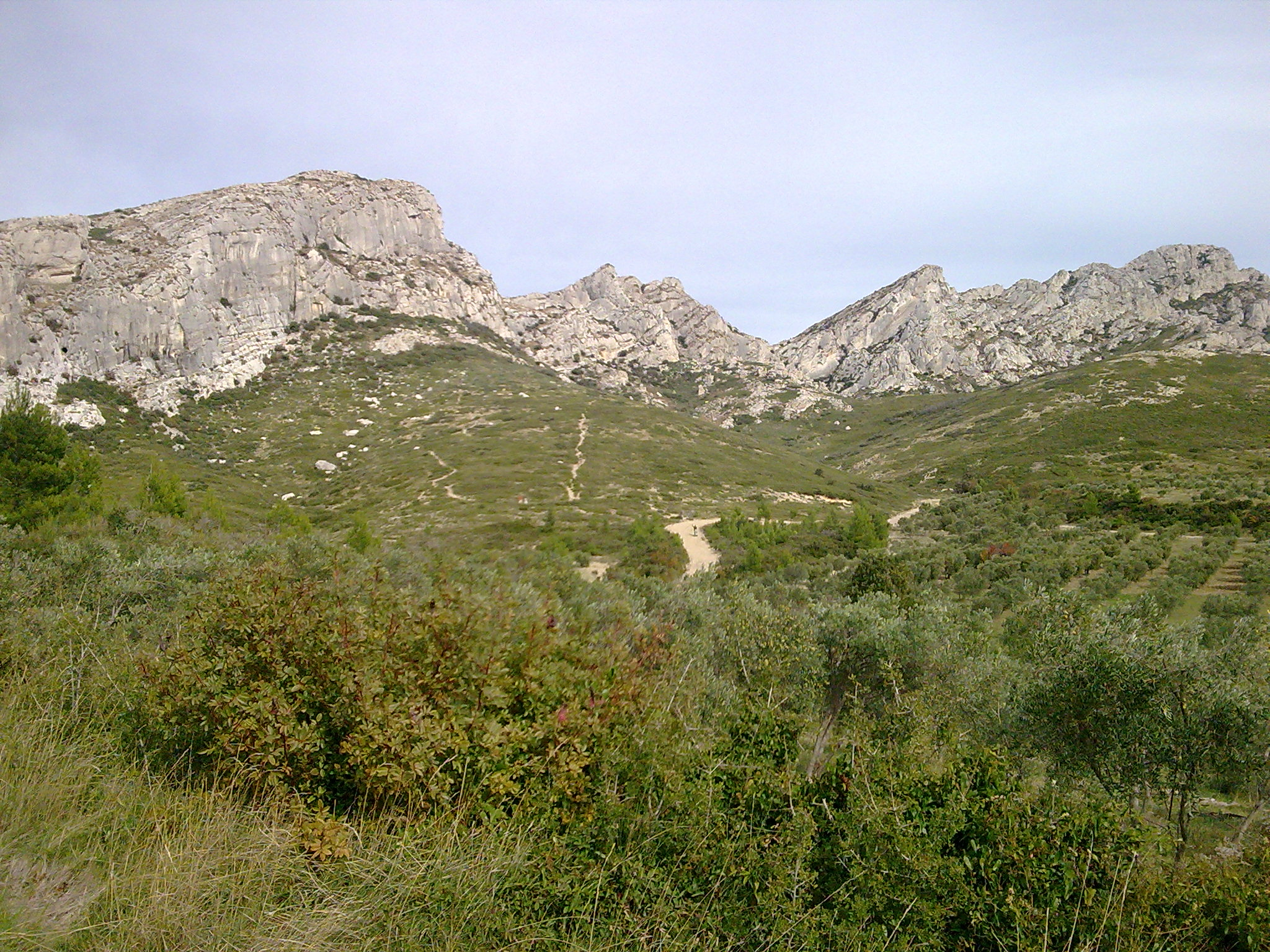 Massif des Alpilles à Aureille (Bouches-du-Rhône)